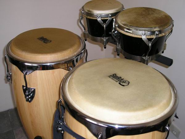 Mijn eigen conga's en bongo's.